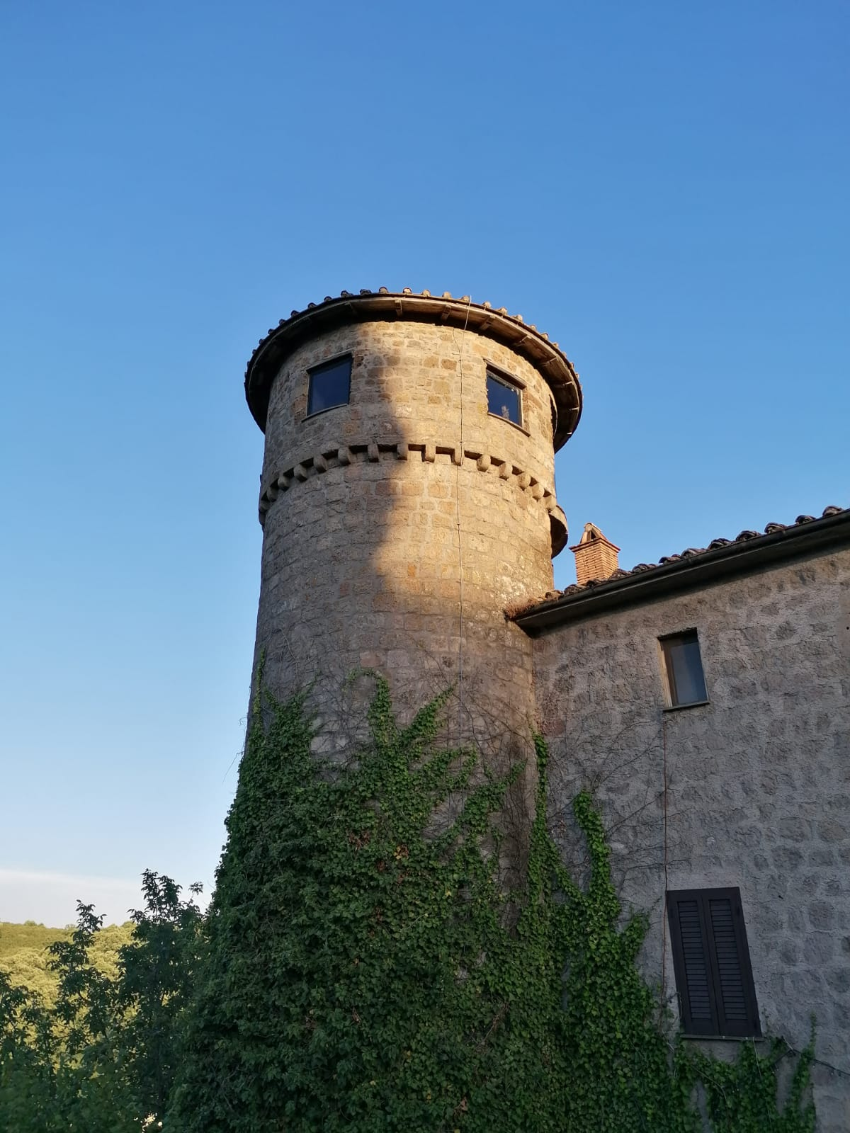 Torre caratteristica del castello, visibile dal paese